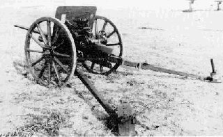 Japanese Type 1 37mm anti-tank gun